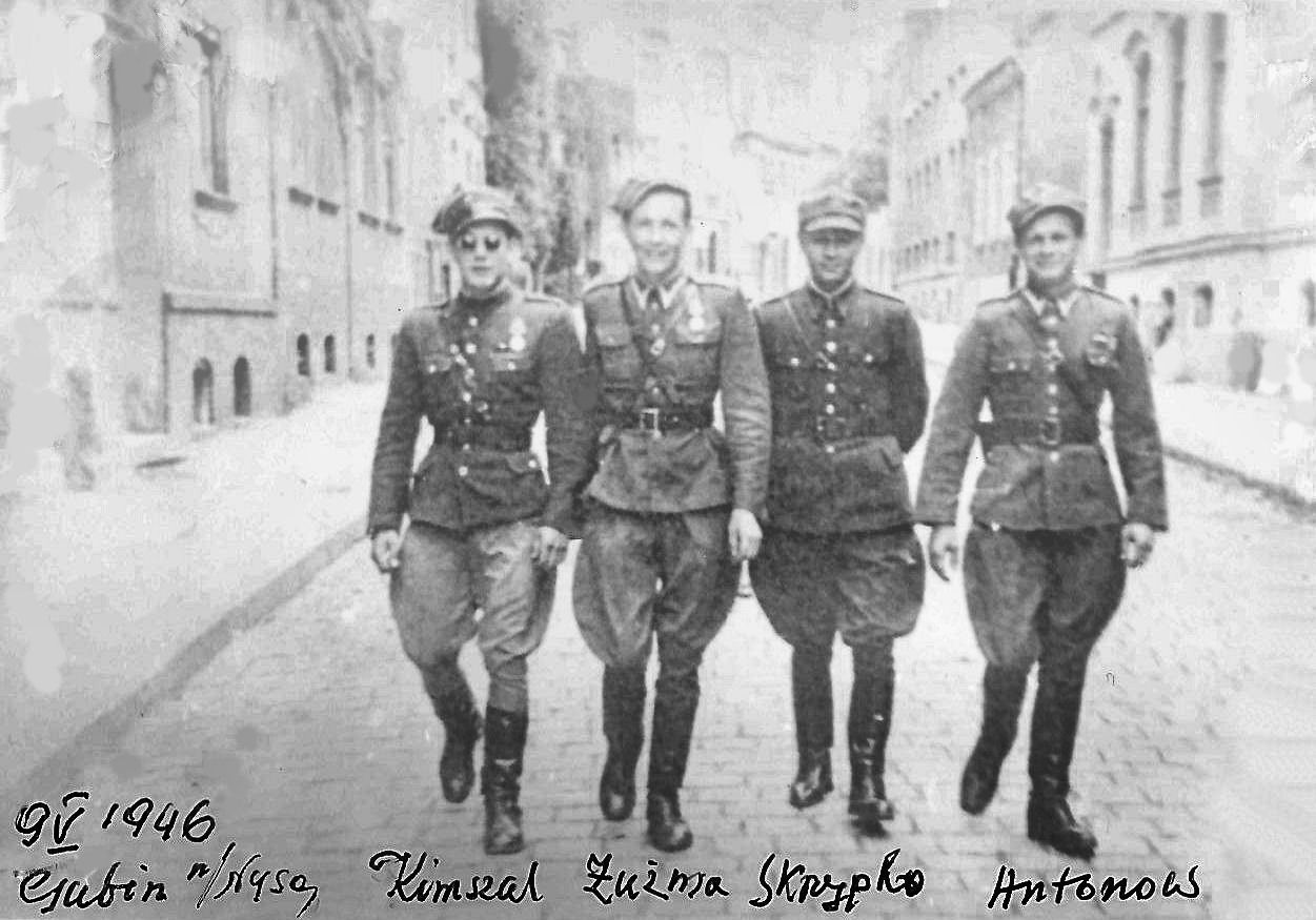 Oficerowie 6 Komendy Odcinka w czasie wolnym w Gubinie. Stanisław Kiszmal pierwszy z lewej